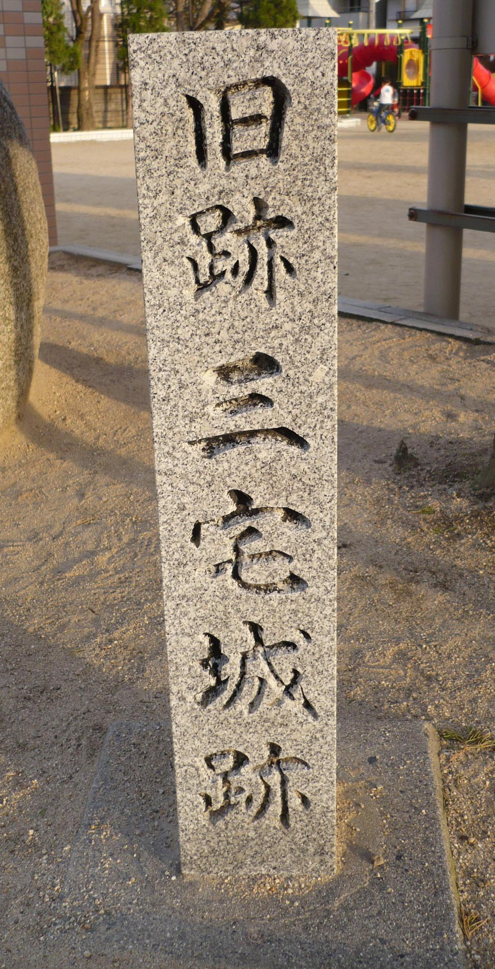 公園内にある三宅城の石碑